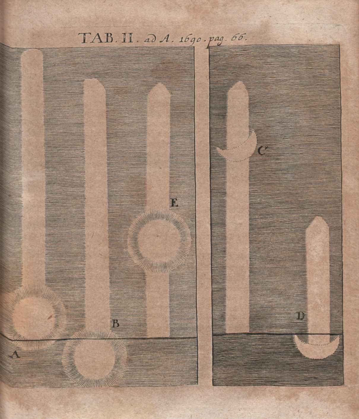 Illustration